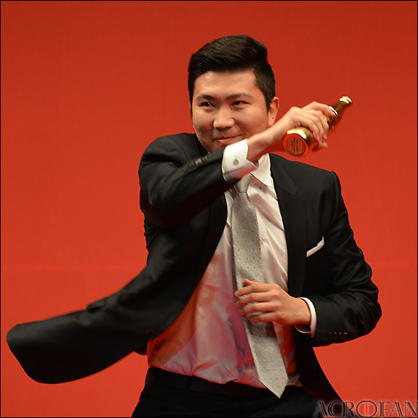 코카-콜라 체육대상 20주년 기념 트로피 증정식